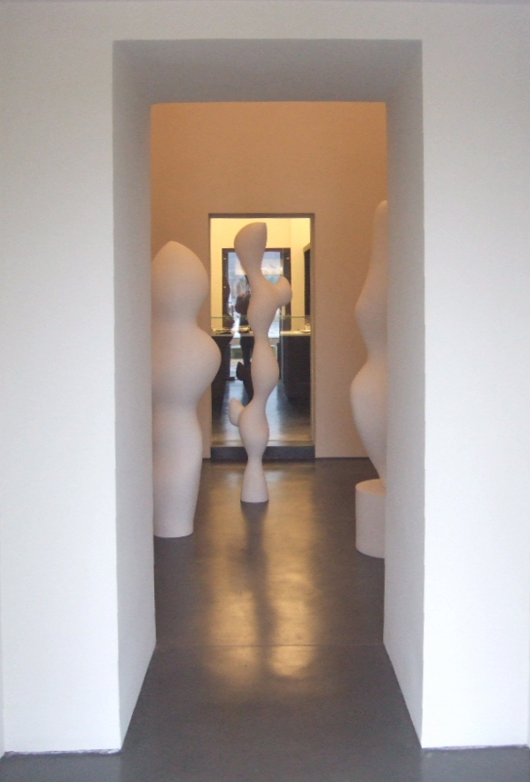 Arp Museum – Bahnhof Rolandseck – Blick von außen in das Sockelgeschoss – Skulpturen von Hans Arp